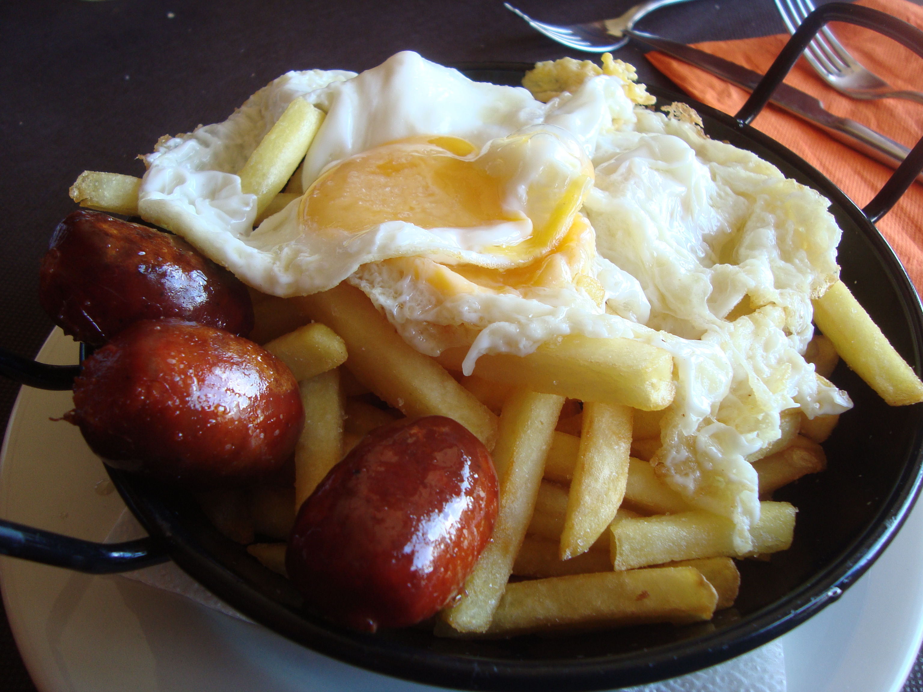 Patatas fritas, huevo y chorizos de Torrijas